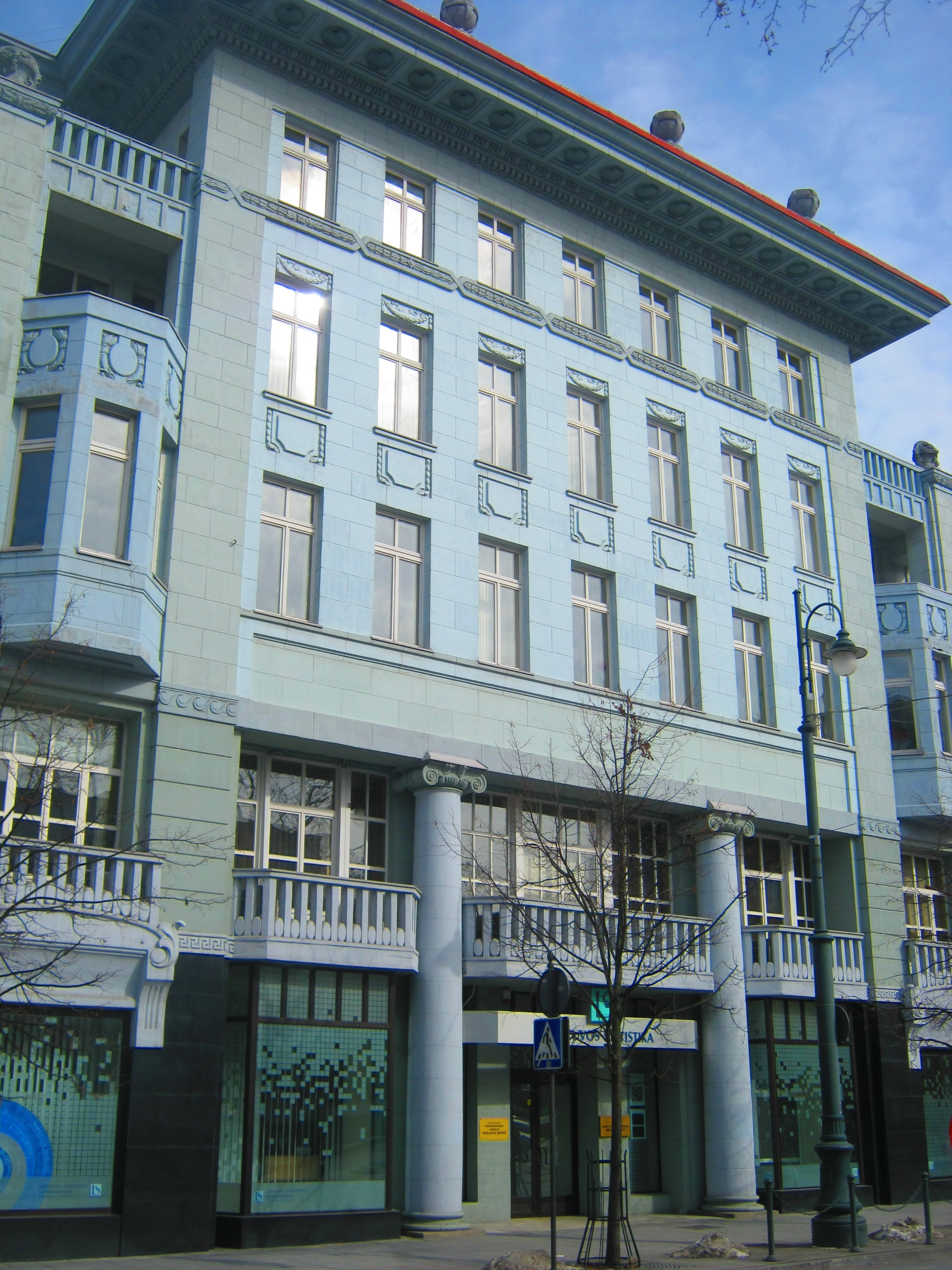 Gedimino prospektas, Vilnius